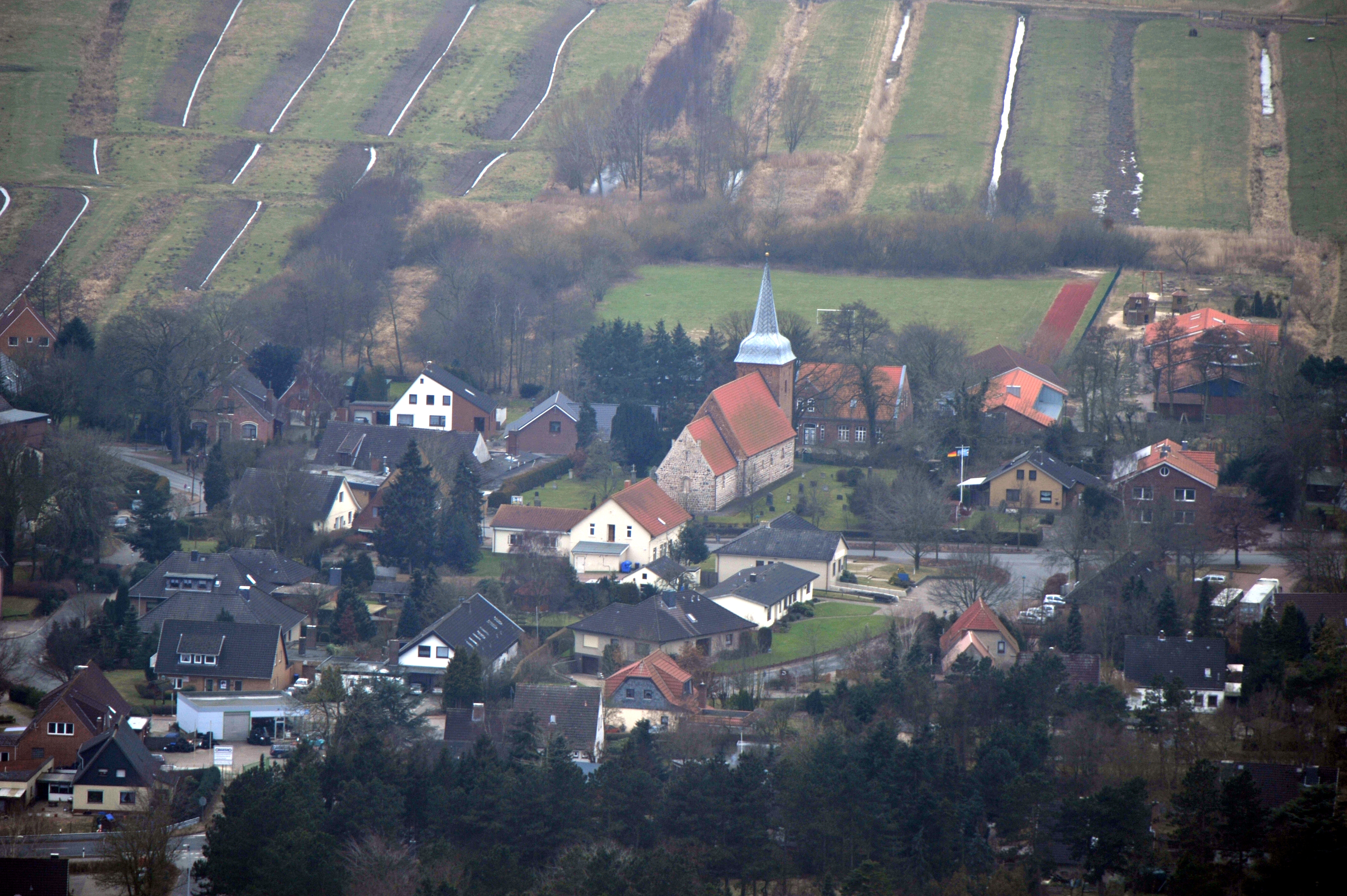 Fotoflugkurs Cuxhaven 2013: Kirche in Midlum